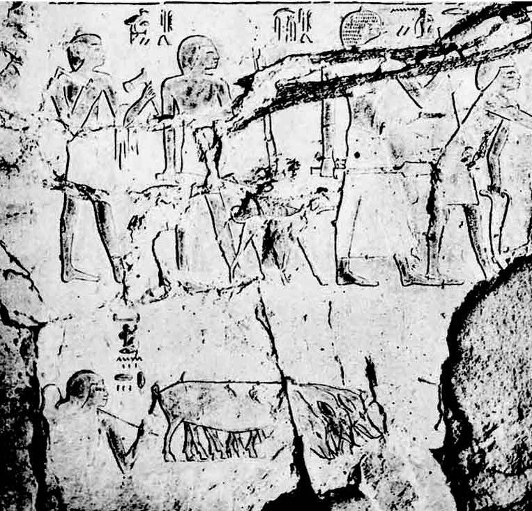 Foto eines Wandreliefs aus dem Felsengrab des Renni (EK7) in el-Kab, Ägypten